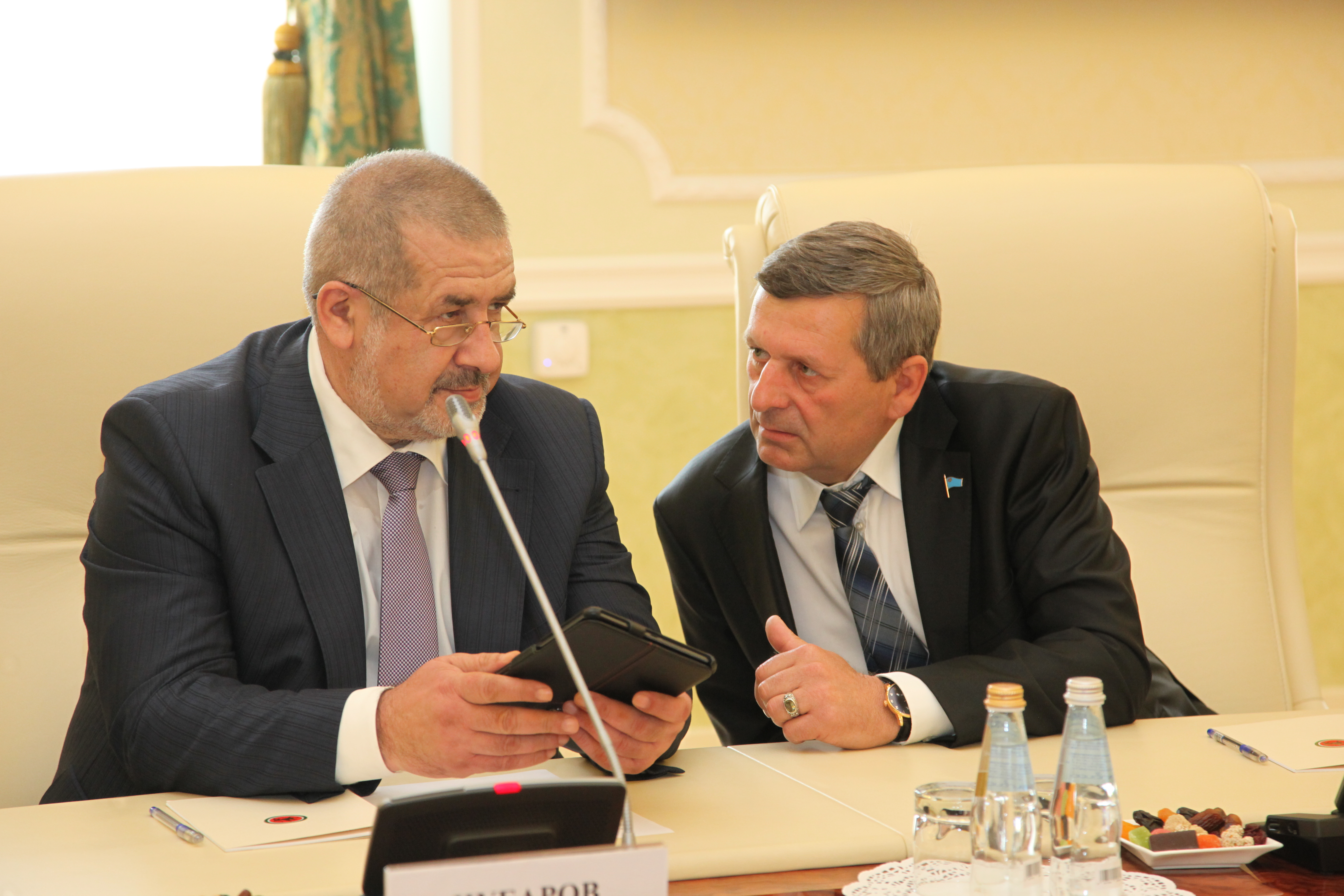 Встреча Президента Татарстана Р.Н.Минниханова с делегацией Меджлиса крымскотатарского народа